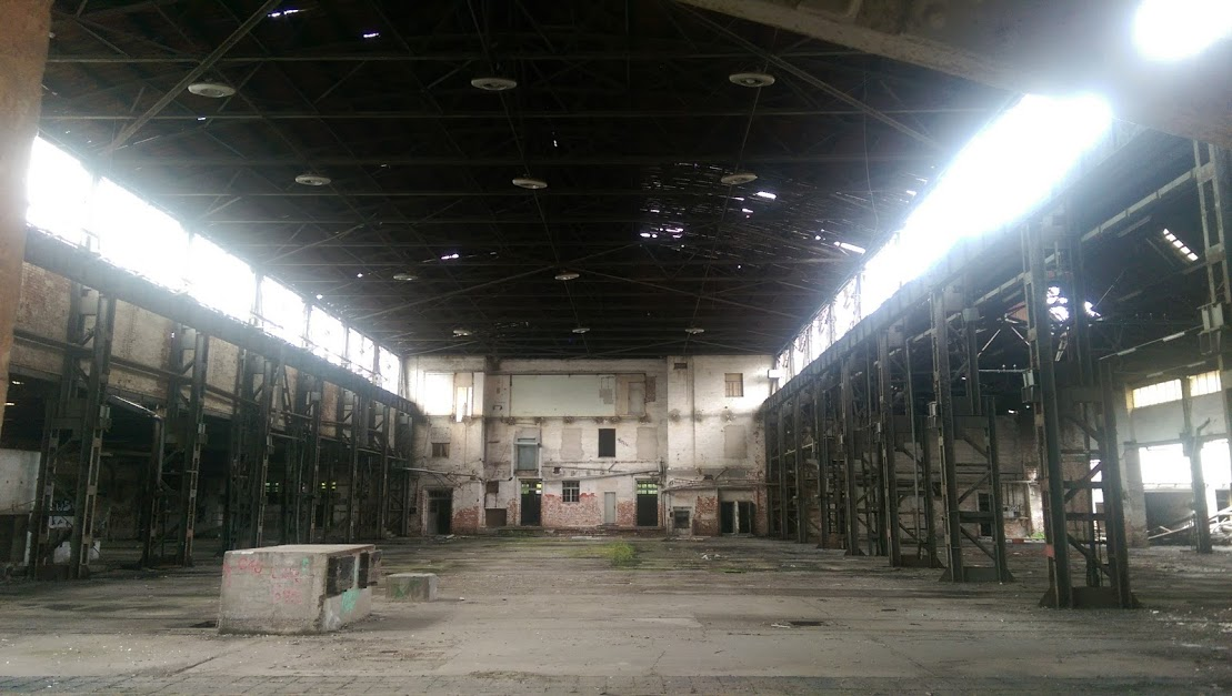 Erfurt Bw P 3